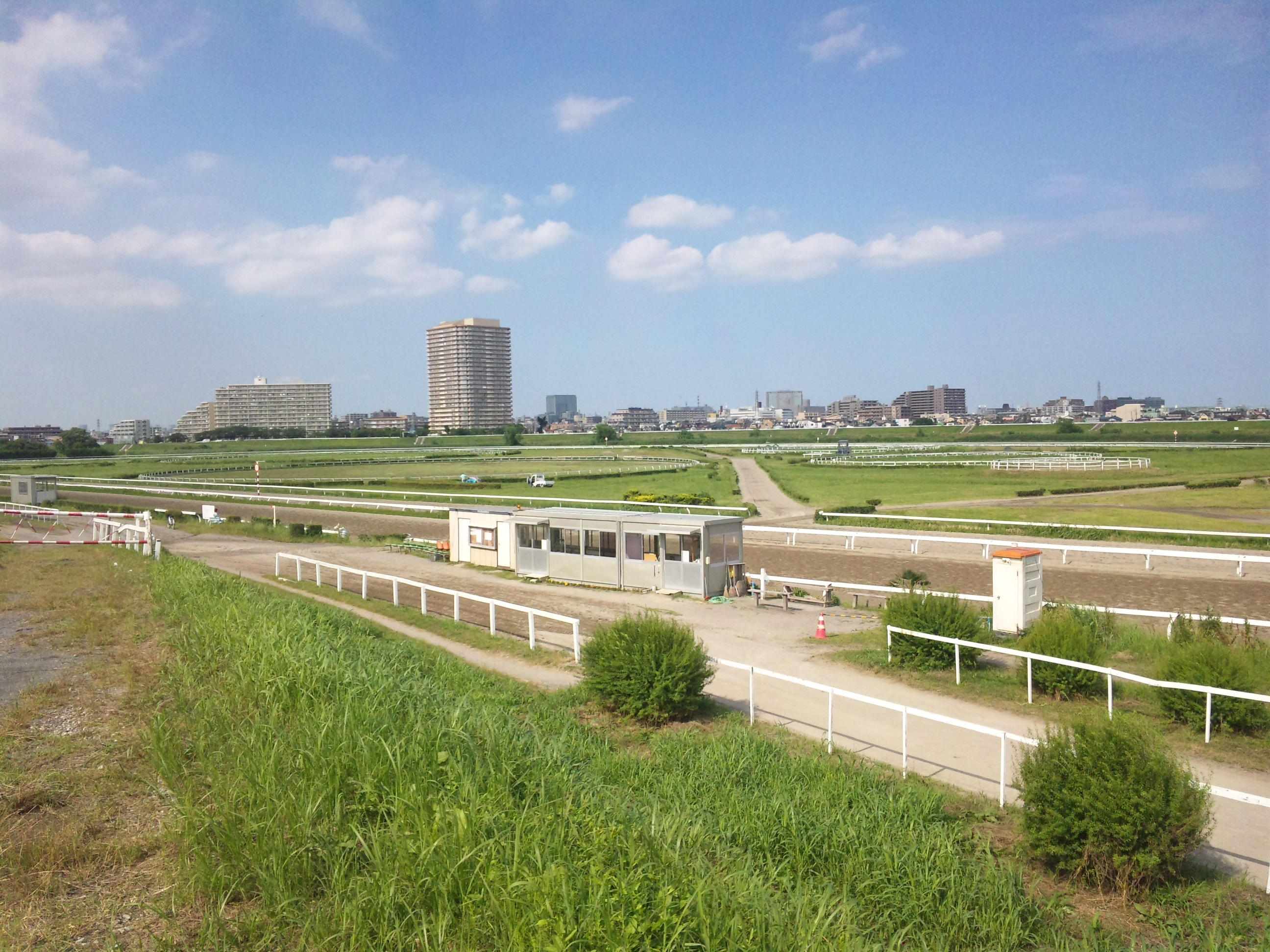 川崎競馬場練習場と多摩川